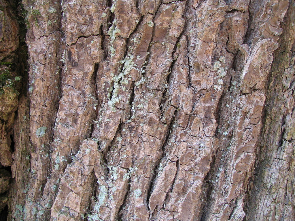 Горски брест: кора (Гоч, фото: Михаило Грбић)